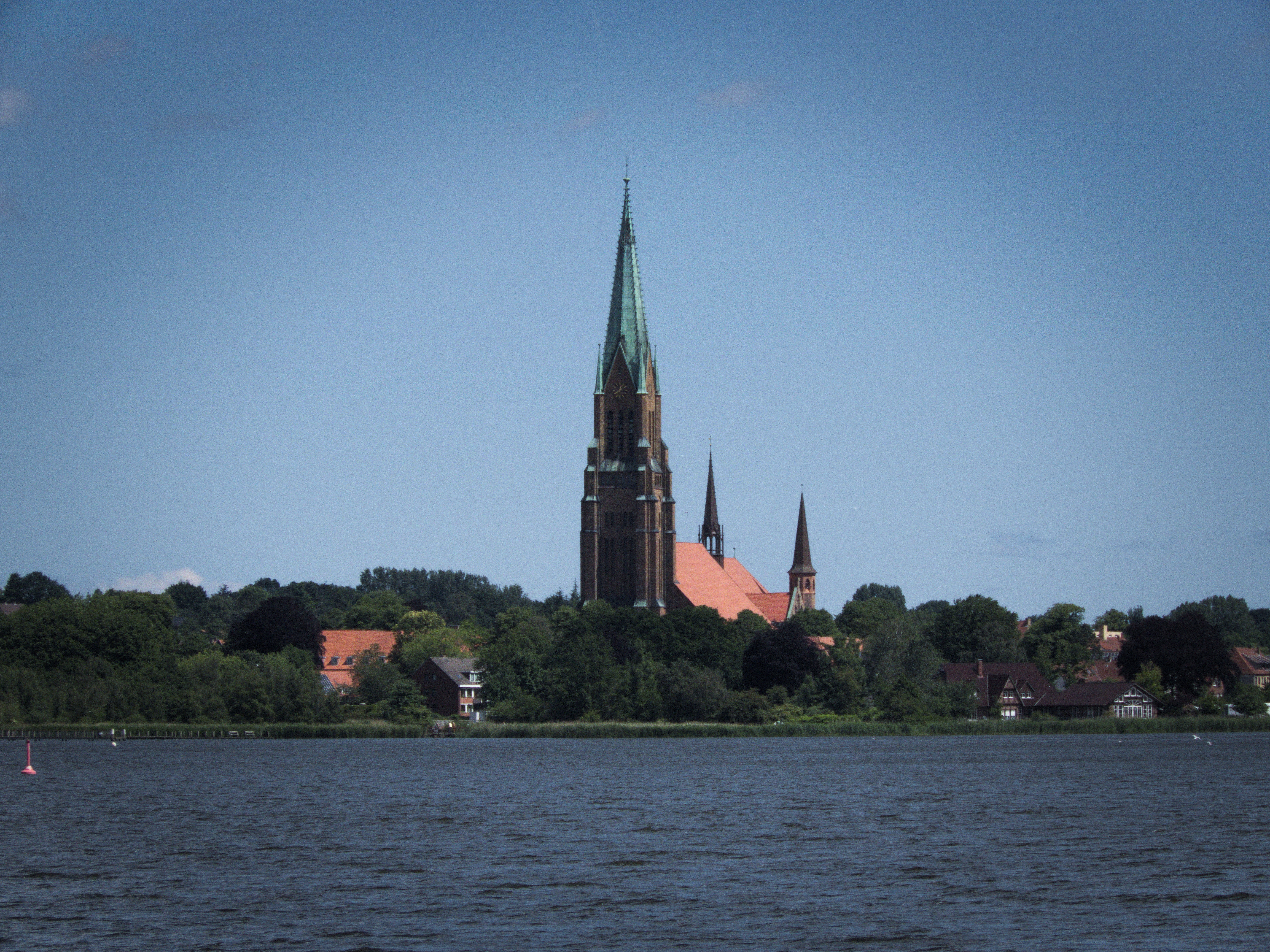 Schleswiger Dom